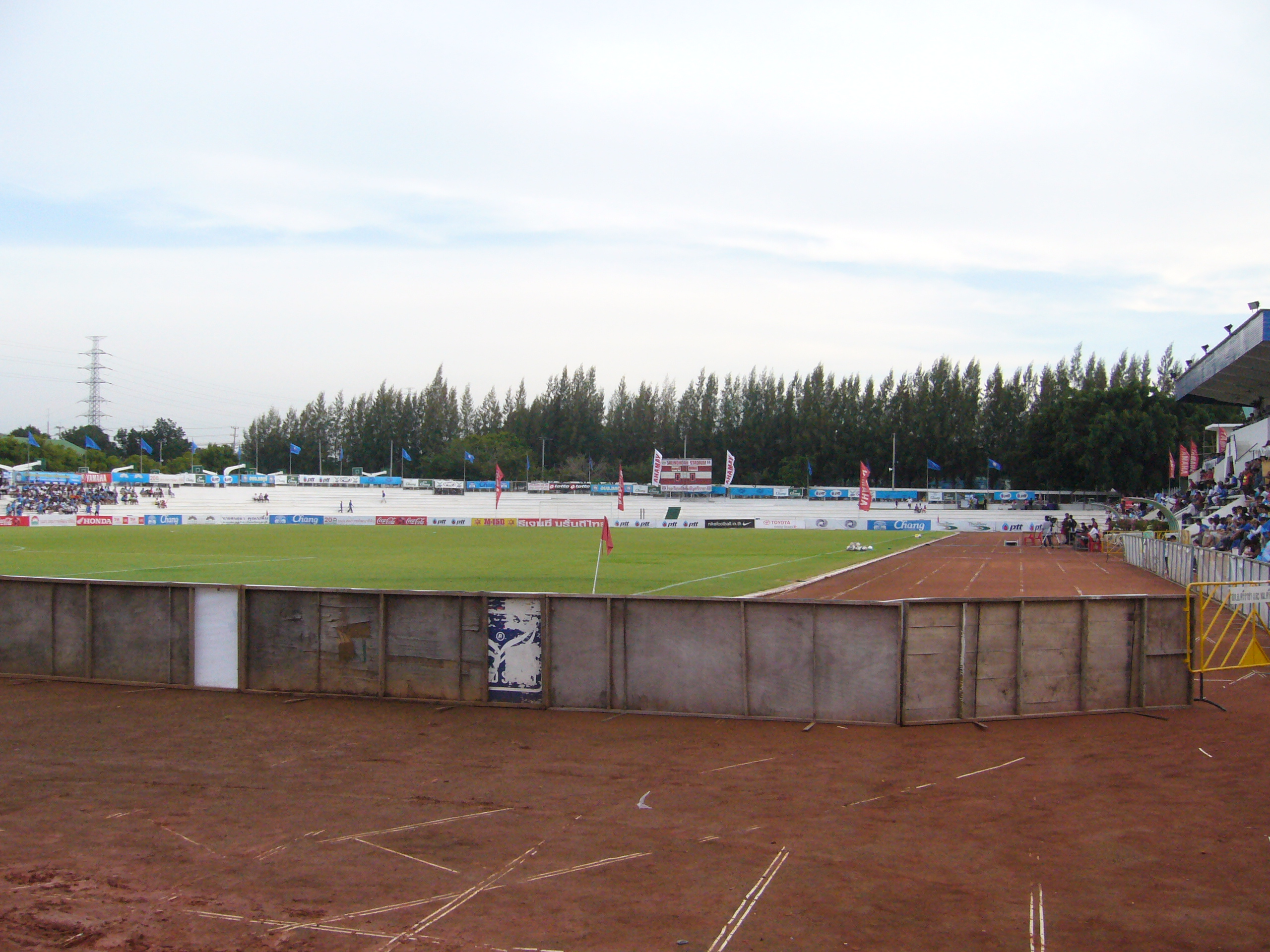 Princess Sirindhorn Stadium, Si Racha